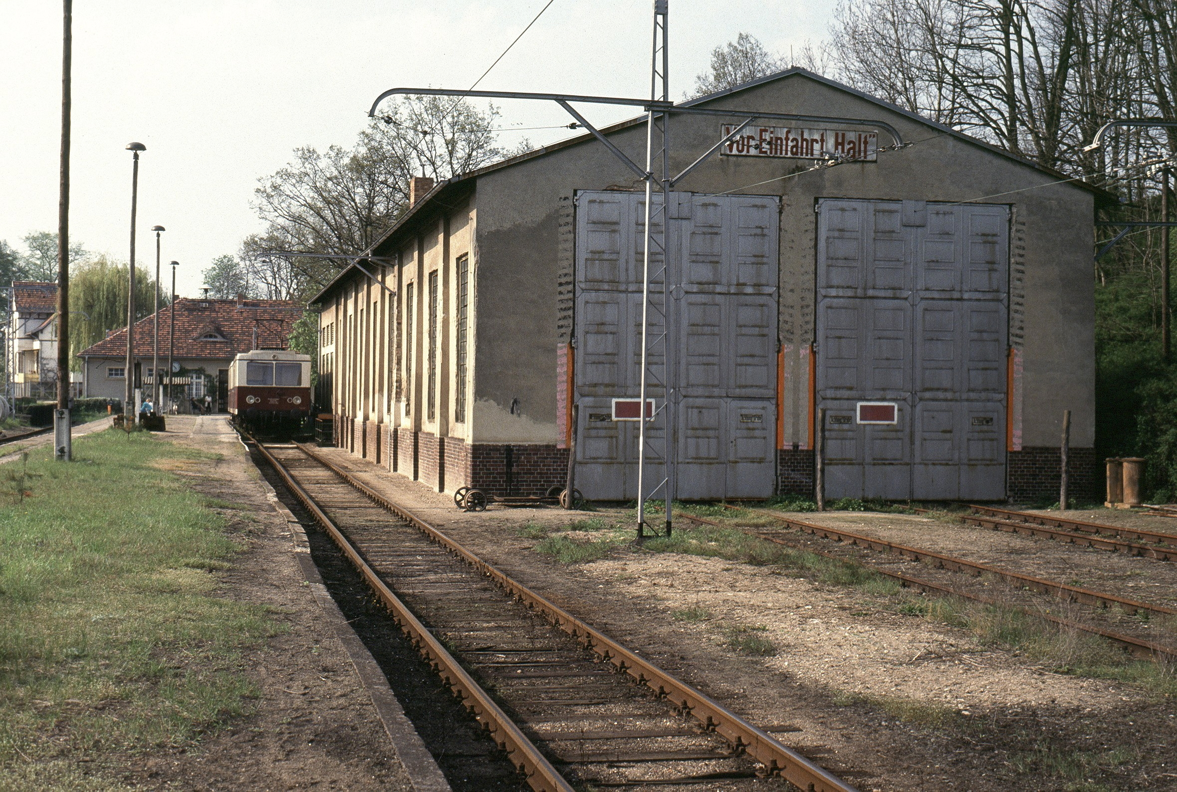 Bahnhof Buckow (Märkische Schweiz))